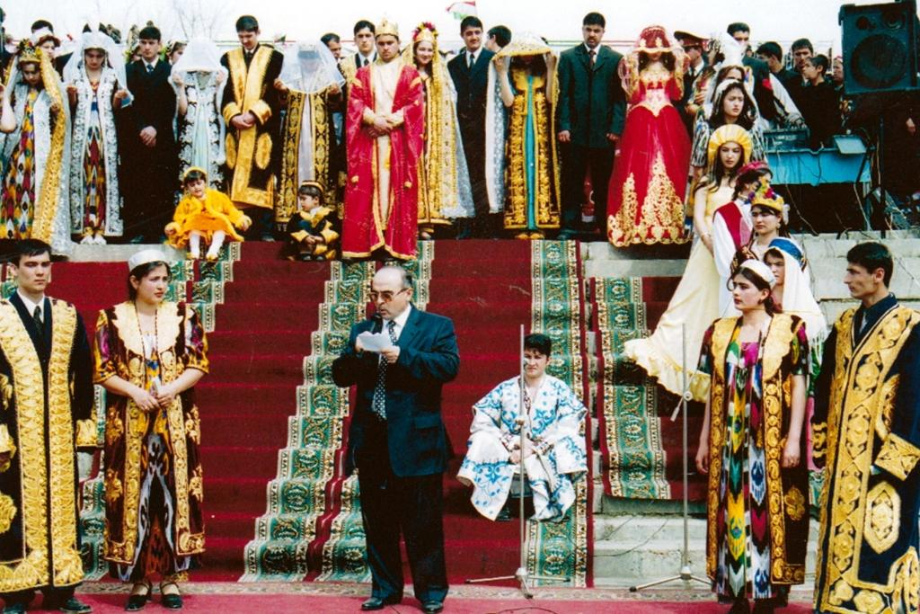 Студенческий ансамбль Таджикского национального университета, Таджикистан